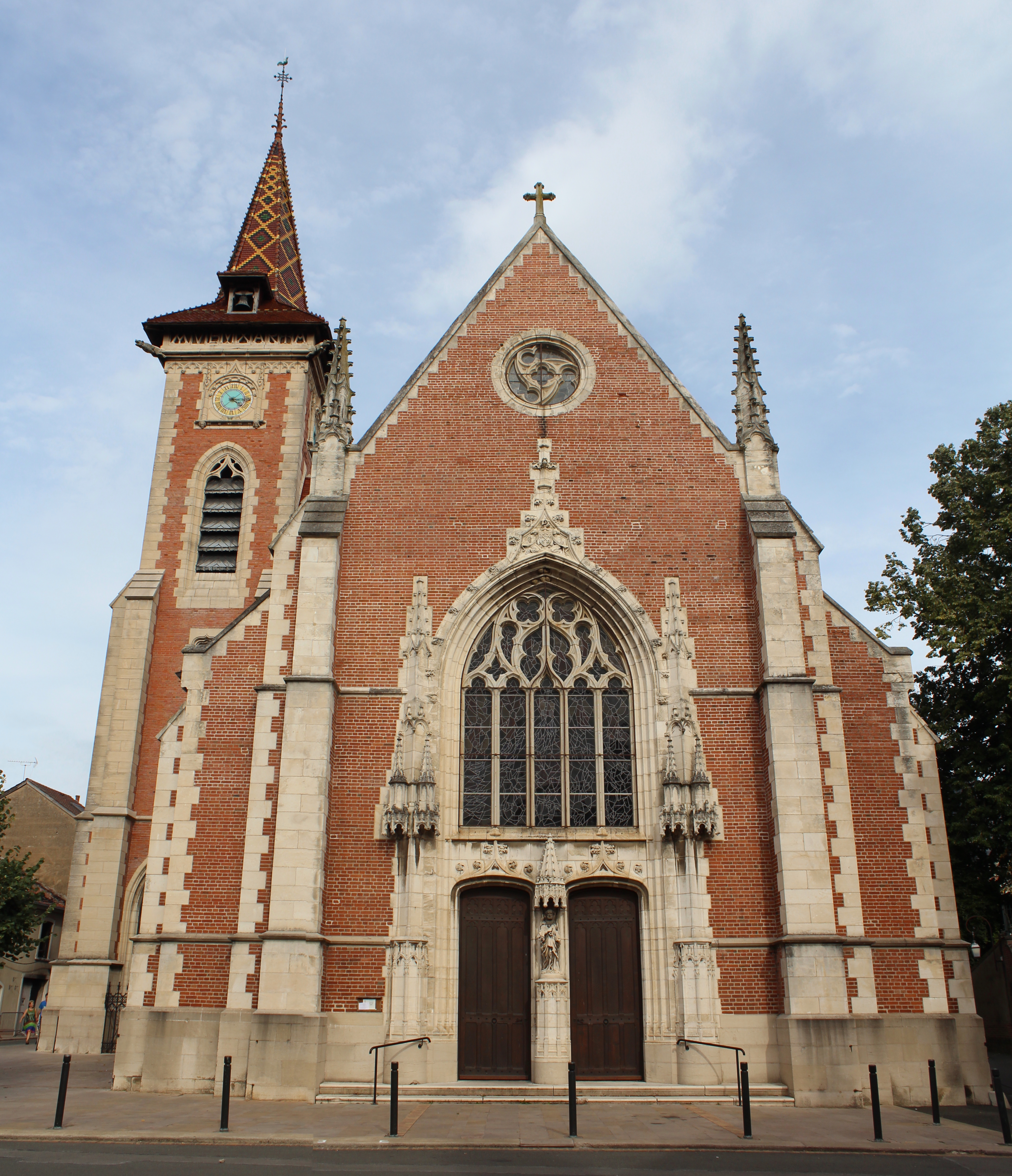 Église Saint-Pierre de Louhans.